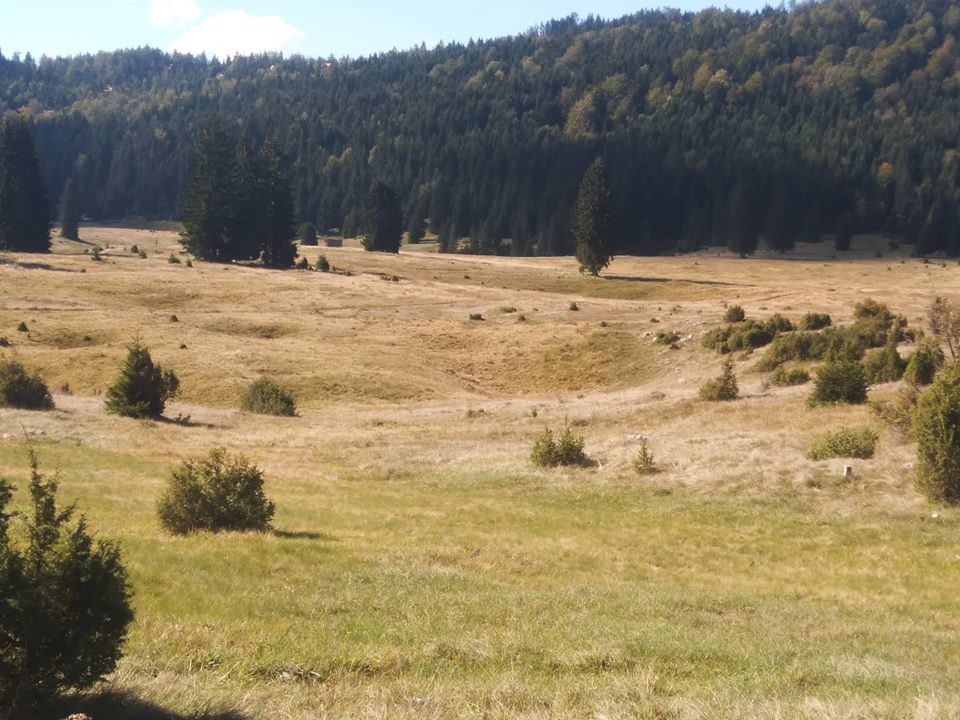 Празне рупе од некадашњих бара